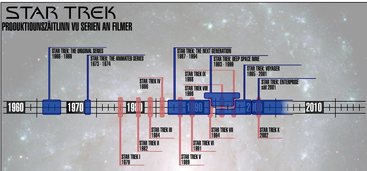 Star Trek Produktiounszäitlinn vu Serien a Filmer